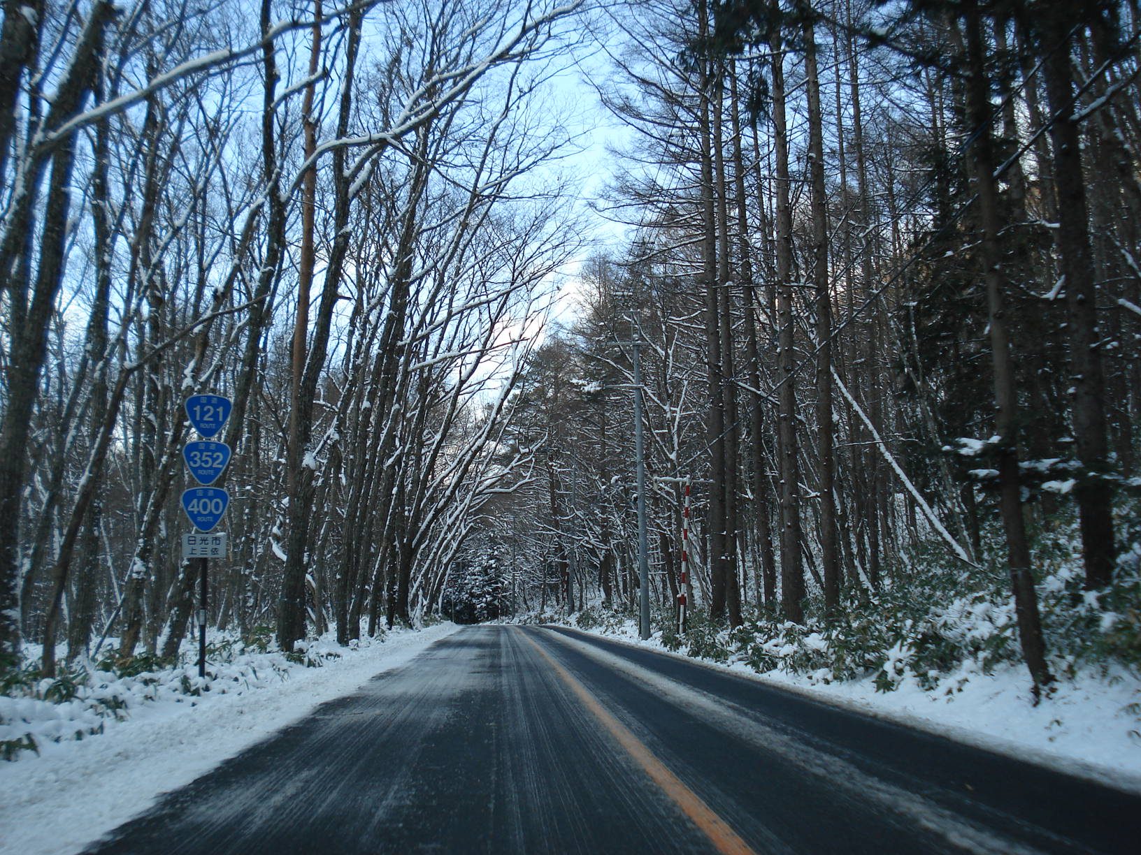 国道121号と国道352号と国道400号と、3つの国道が重複する区間。栃木県日光市上三依付近。